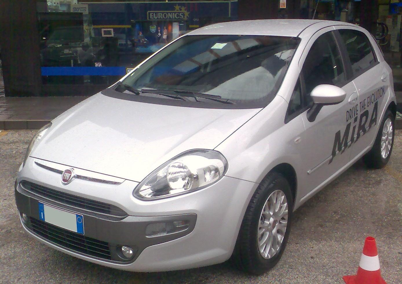 La nuova Punto Evo MY2009 con motore 1.4 16V Multiair